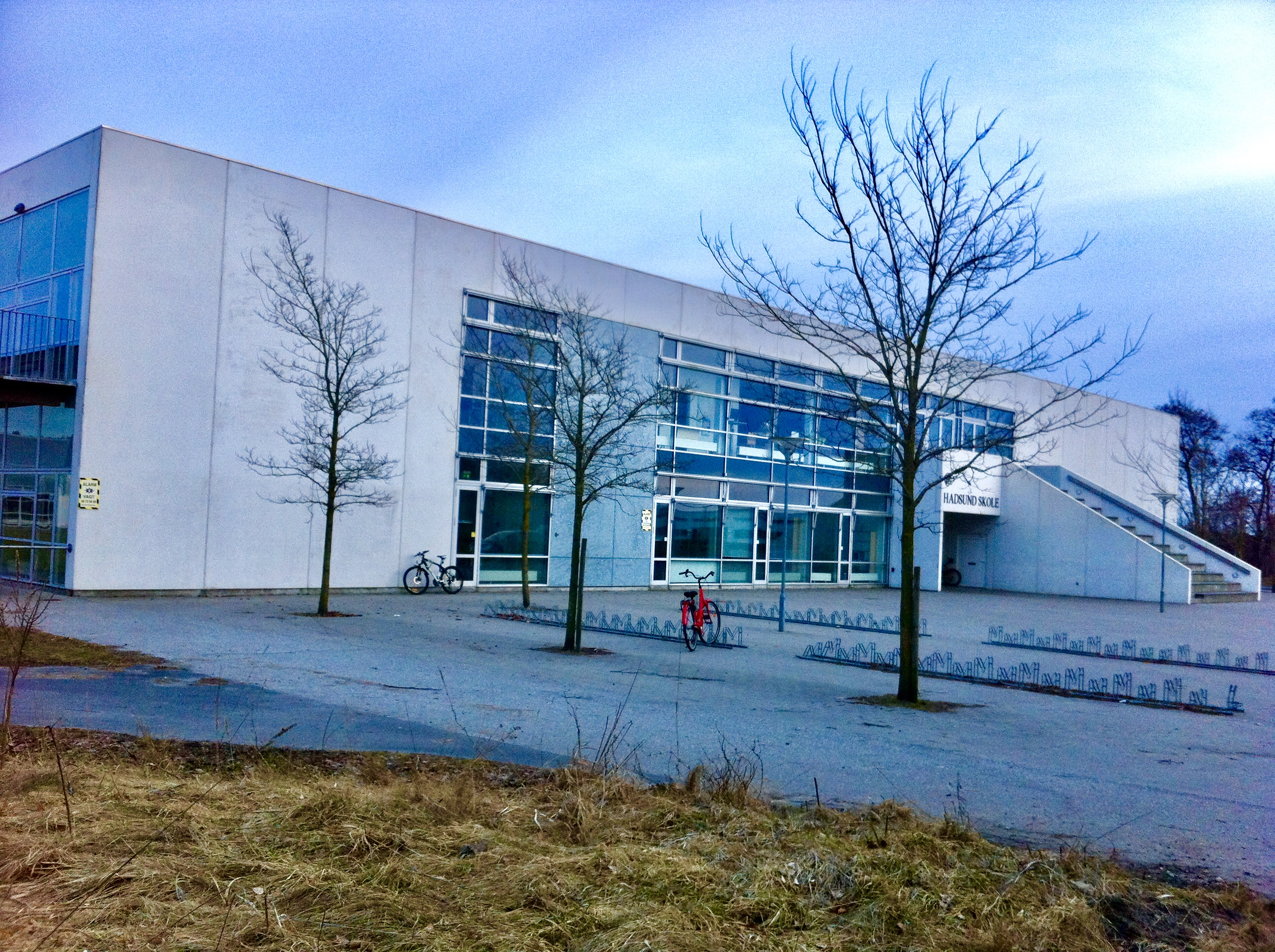 Hadsund Skole. Stadionvej 5, 9560 Hadsund.